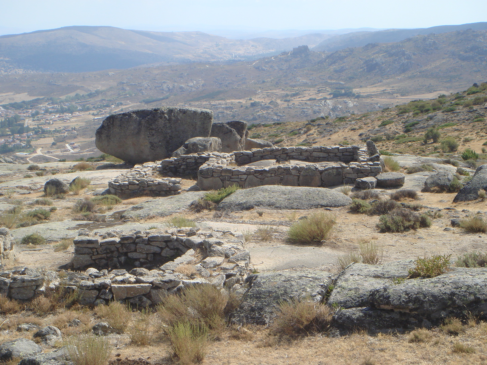 Viviendas excavadas en el Castro de Ulaca, Villaviciosa (Ávila) España.